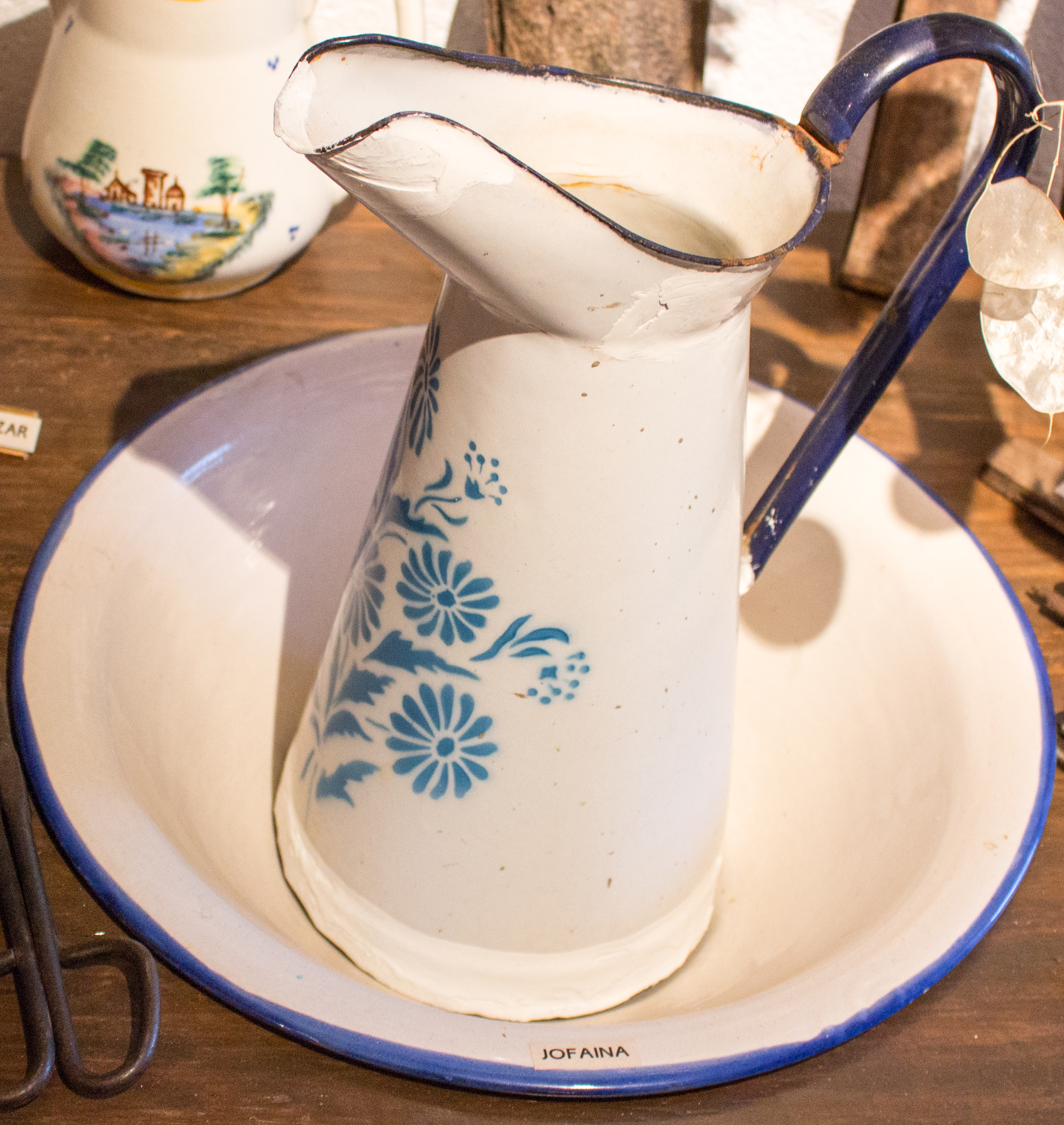 Jofaina